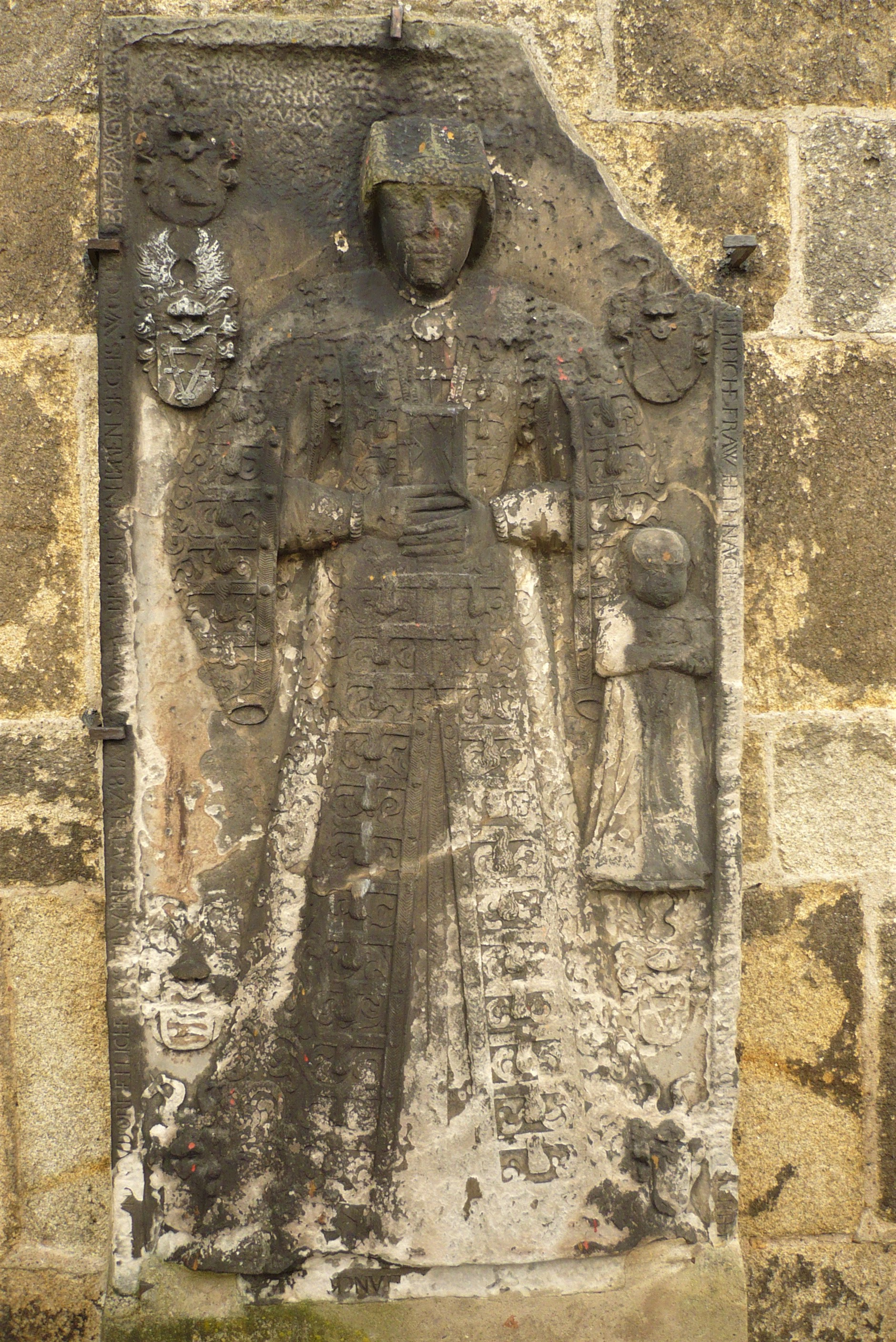 Kościół w Wierzbnej